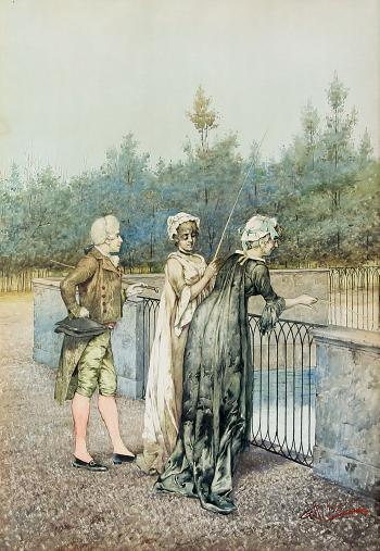 "Pesca nel laghetto della villa, aquarello, 71 x 50 cm., firmato, collezione privata